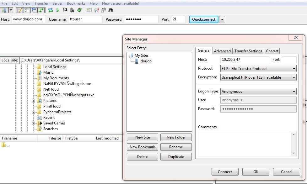 Монгол: Filezilla программ ашиглана FTP сервер лүү файл хадгалах